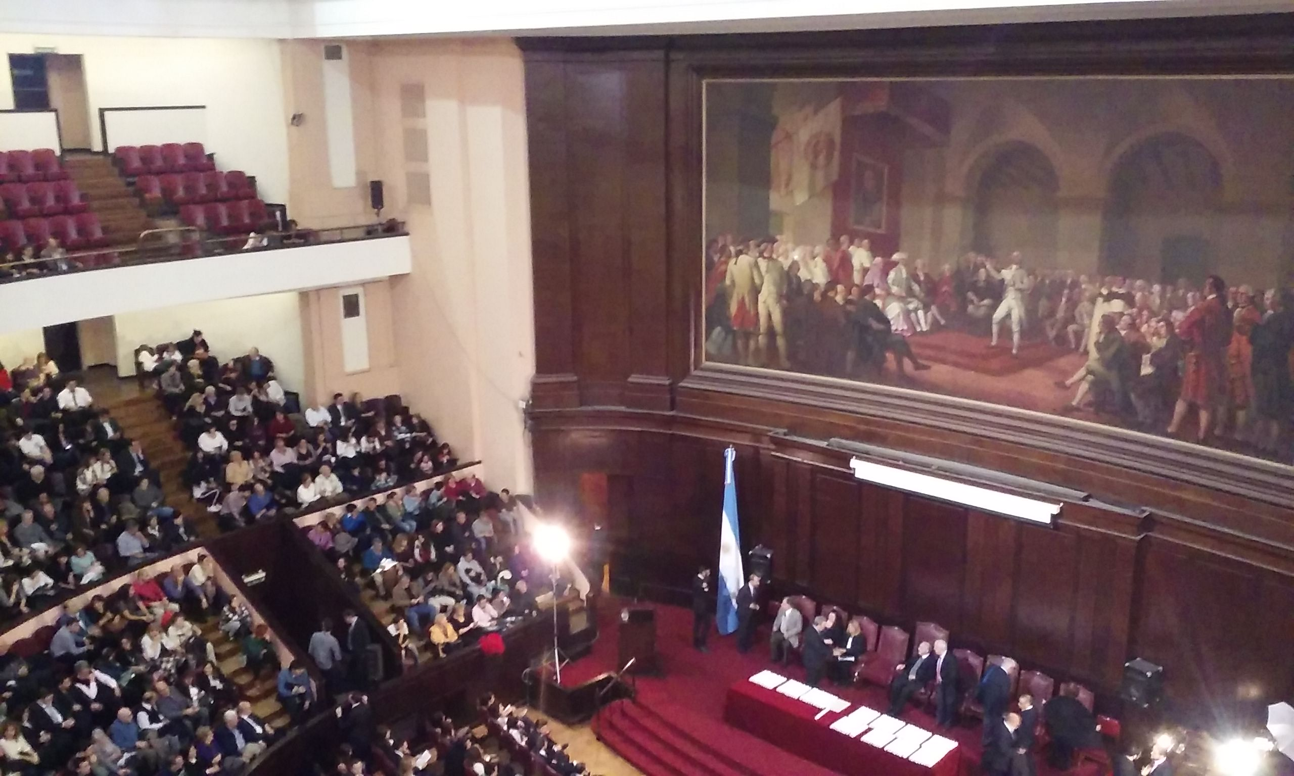 Aula magna de la Facultad de Medicina de la Universidad de Buenos Aires en junio de 2017, durante una ceremonia de graduación de estudiantes.